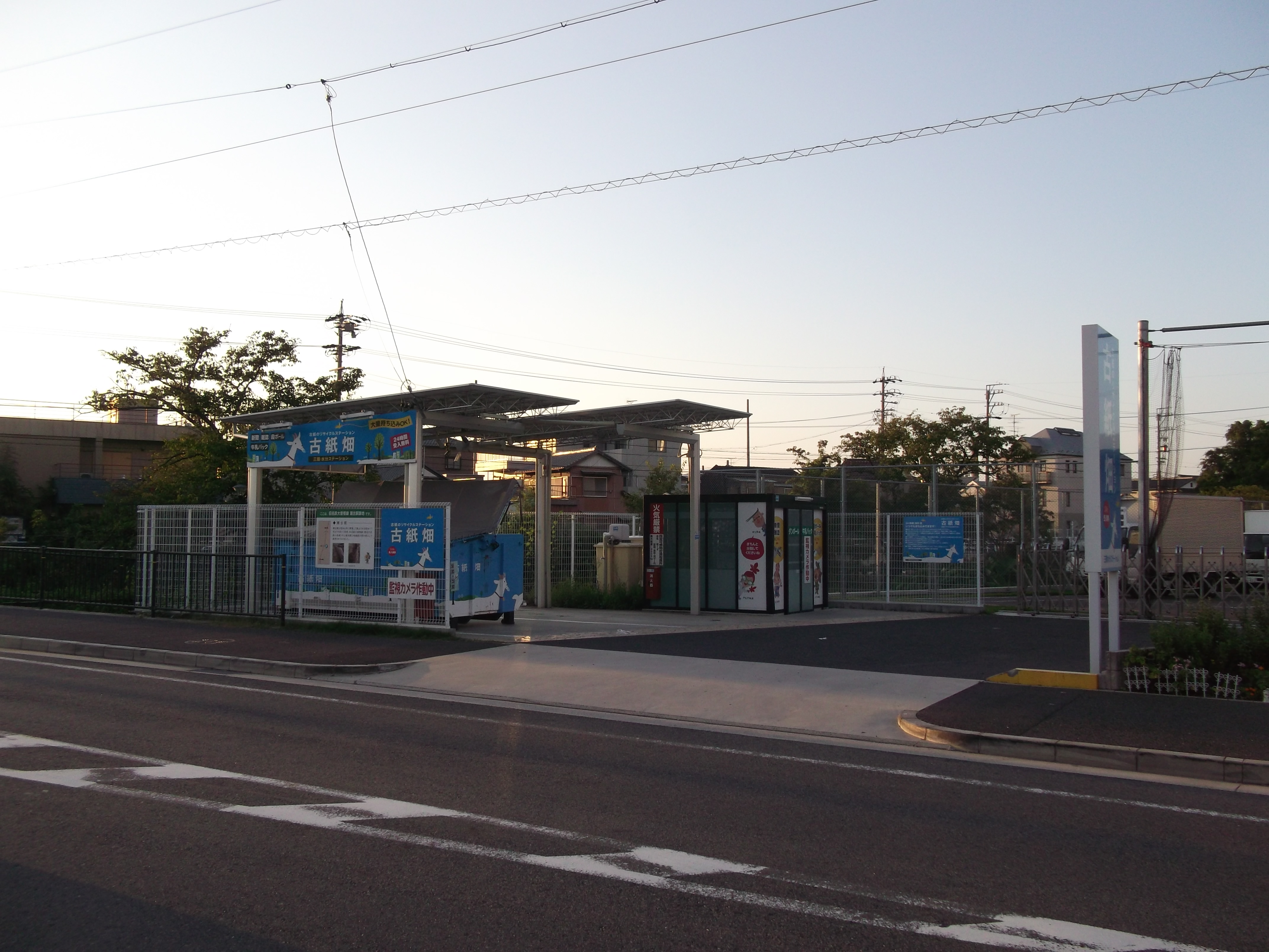 名古屋市守山区の旧名鉄瀬古駅跡にある「古紙畑 三階・水分ステーション」を南側公道東側より撮影。